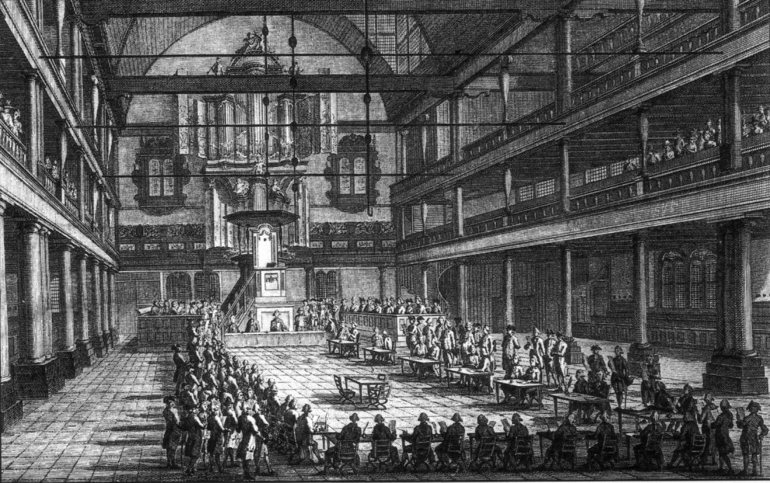 Gravure van omstreeks 1791. Maker onbekend.